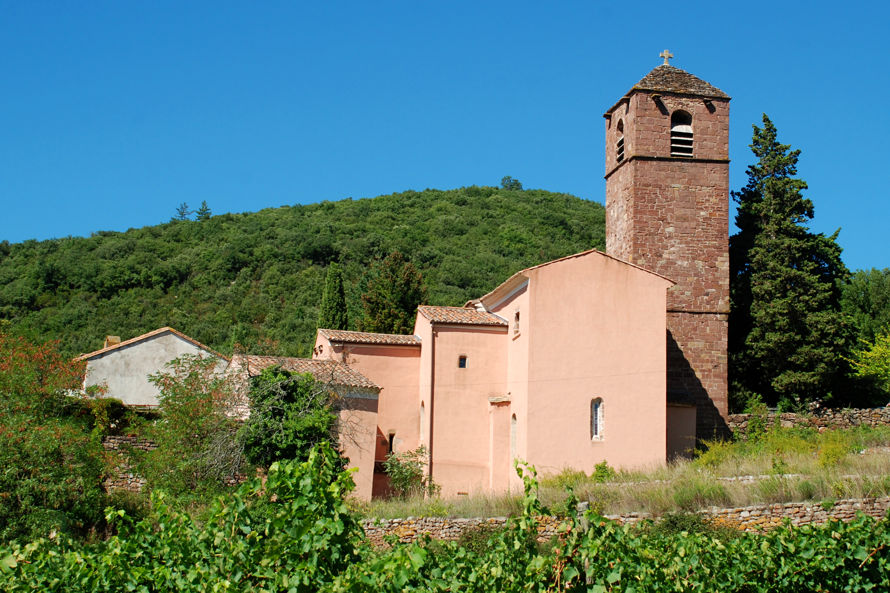 France - Languedoc - Hérault - La Tour-sur-Orb - Église Saint-Cyr et Sainte-Julite de Saint-Xist .